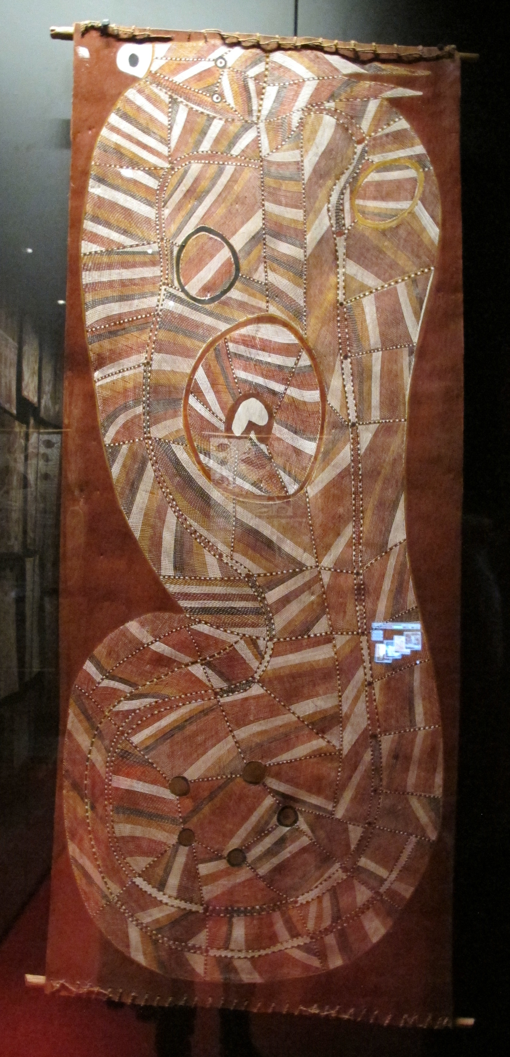 Musée du quai Branly